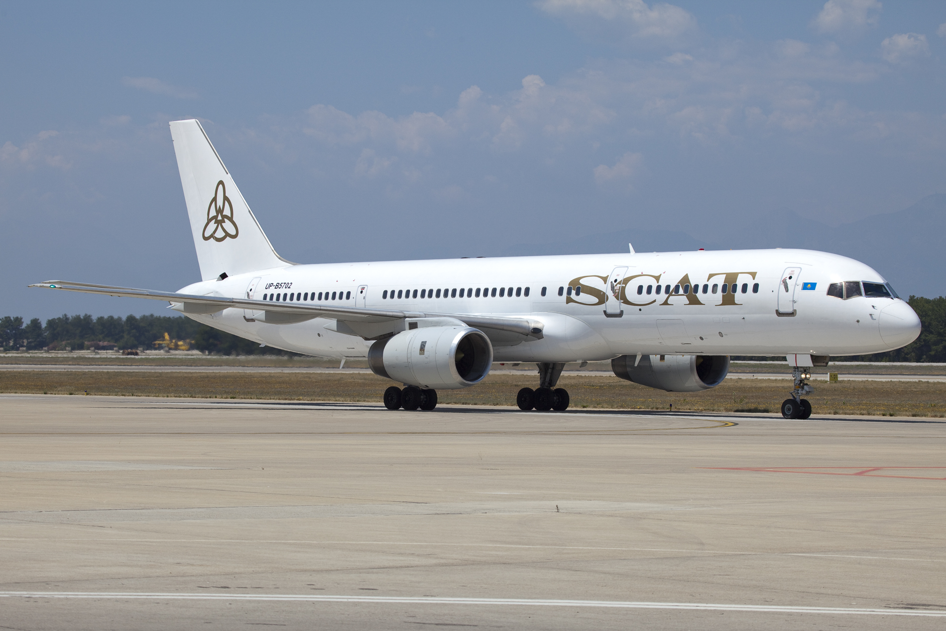 Antalya